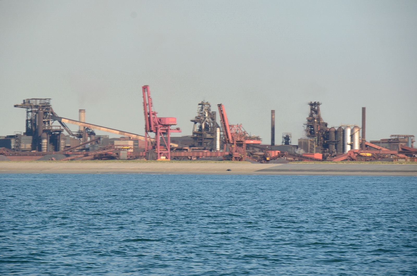 Dunkerque, Nordfrankreich